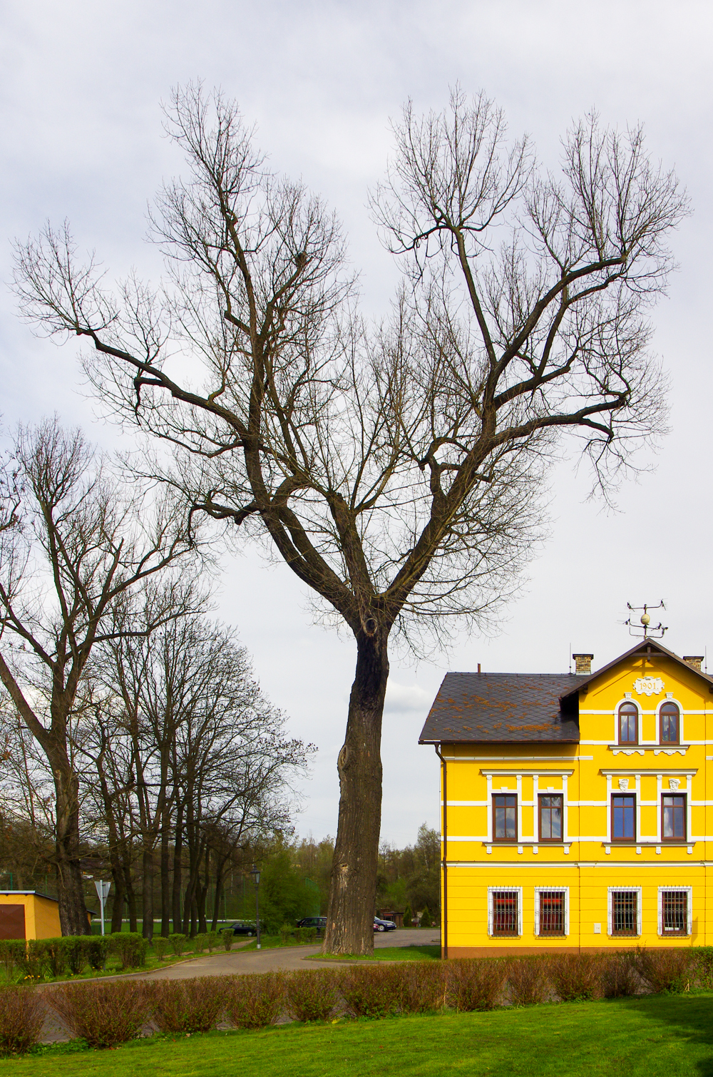 Vintířov, památný strom Topol v zatáčce, okres Sokolov